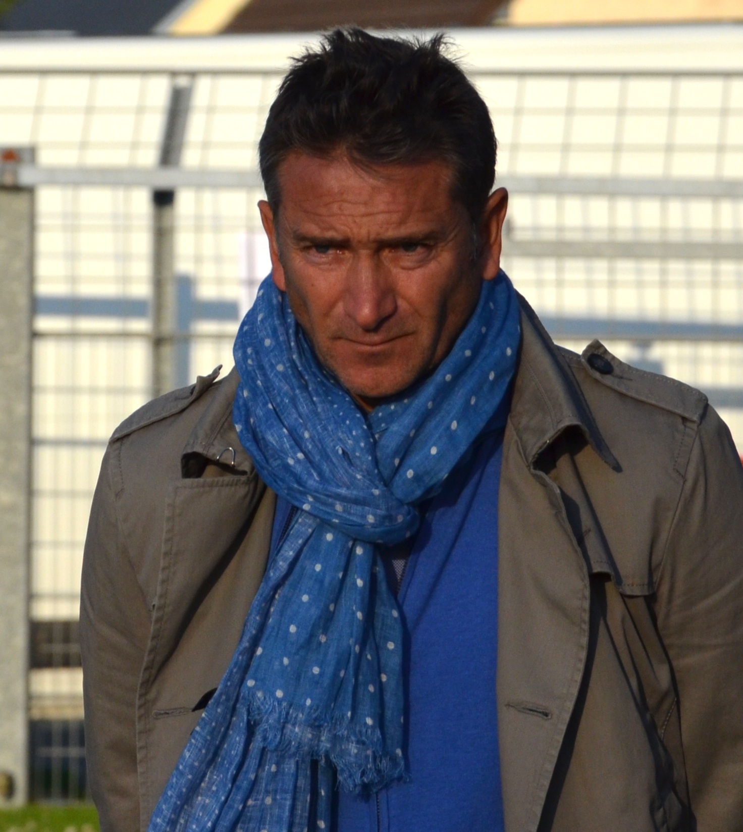 Photographie prise à l'occasion de la rencontre amicale opposant le Stade Malherbe de Caen au Stade rennais, le 9 juillet 2014 au stade Pierre-Comte de Vire. Ici, Philippe Montanier.